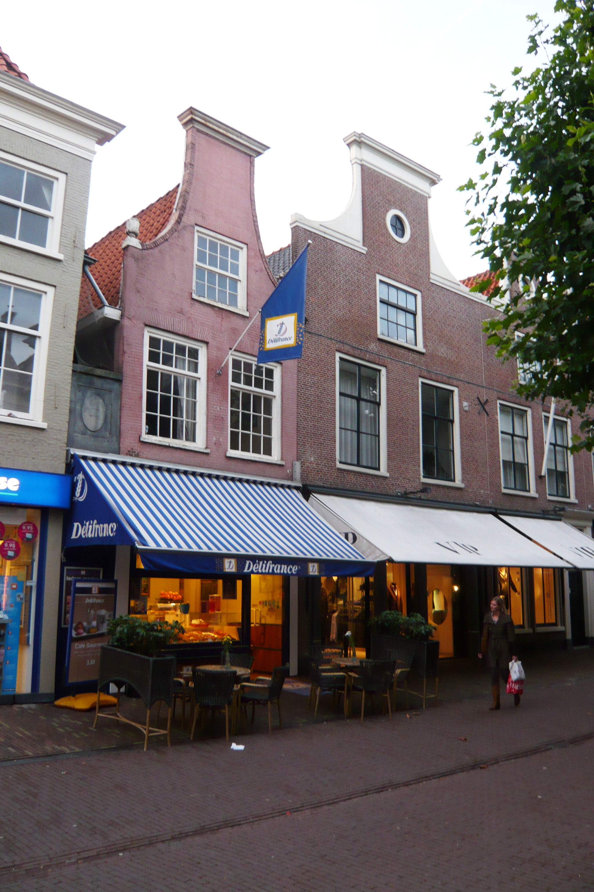 Former smithworks of Beijnes; Grote Houtstraat 126, Haarlem